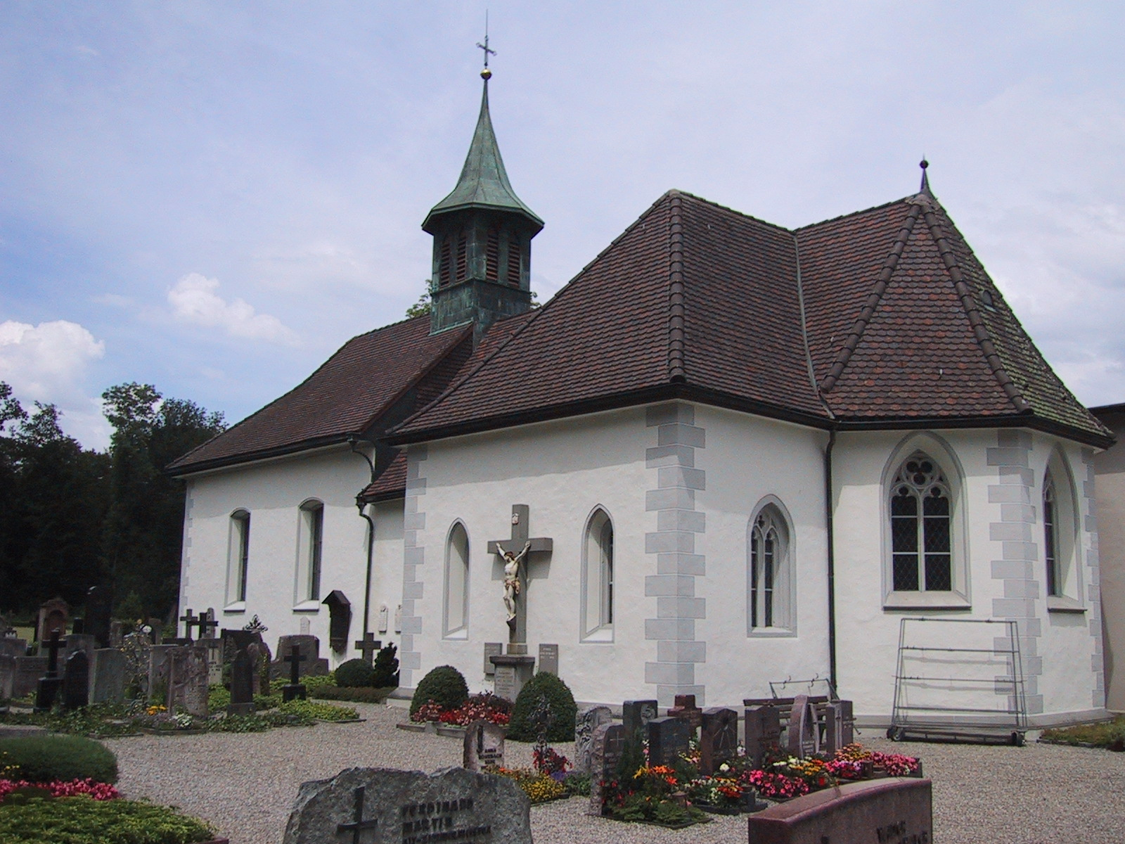 Kapelle Bernrain in Emmishofen, einem Ortsteil in Kreuzlingen, Kt. TG, Schweiz